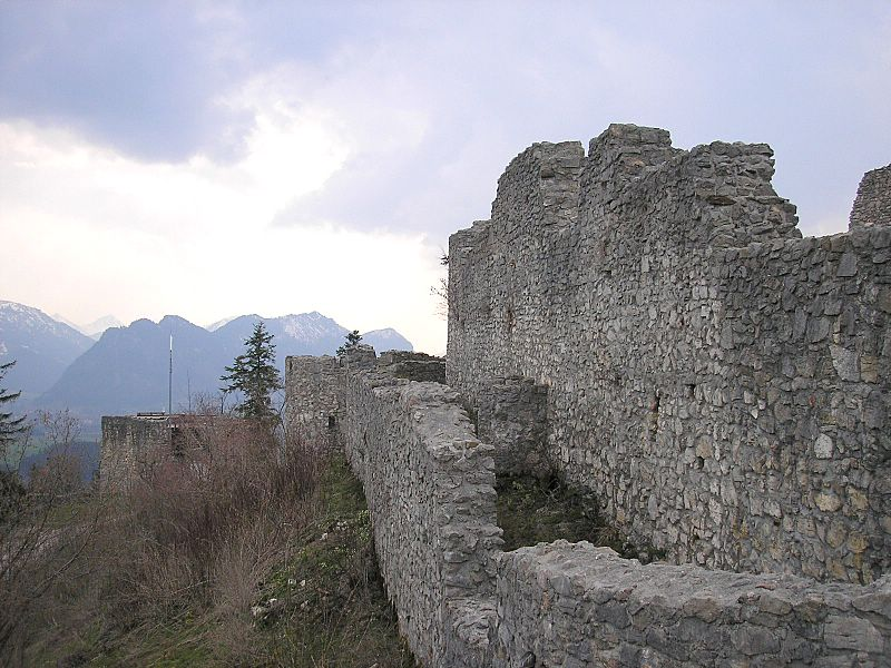 Burg Eisenberg bei Pfronten (Allgäu). Die Ostseite der Hauptburg mit dem Zwinger.